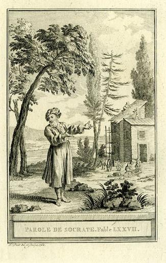 Estampe ; musée Jean de La Fontaine, Château-Thierry, France